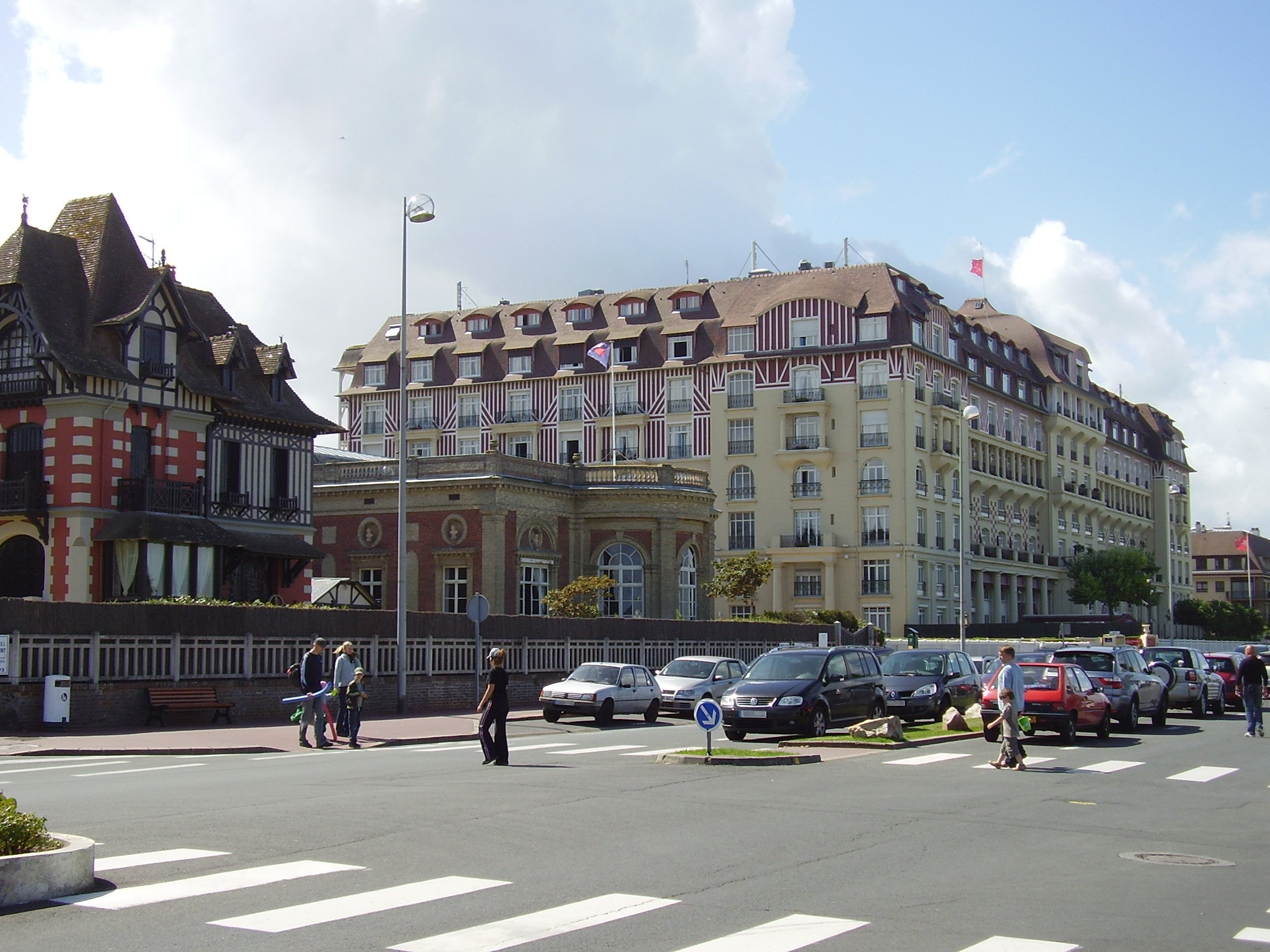 Hôtel Royal, Deauville, Frankreich